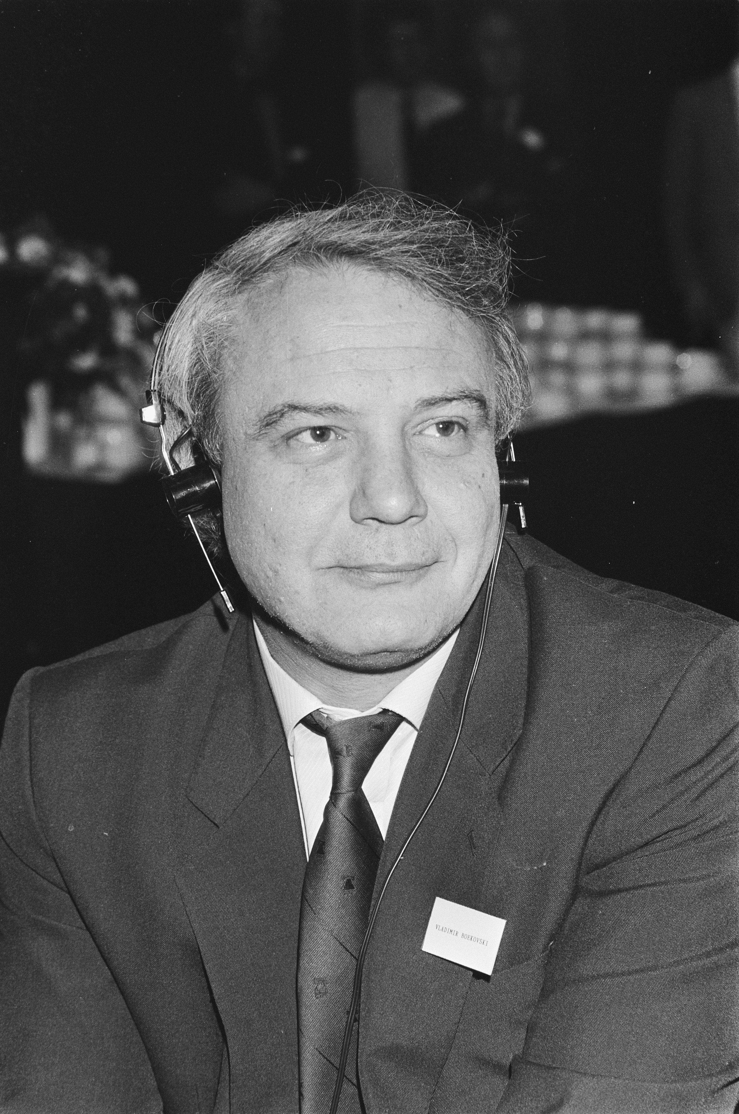 Vijfde Sacharov-congres in Amsterdam; Vladimir Boekovski (close) 21 mei 1987